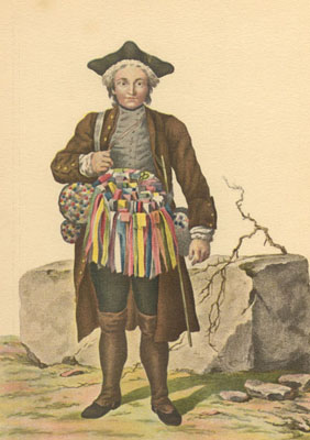 Der Bandlkramer